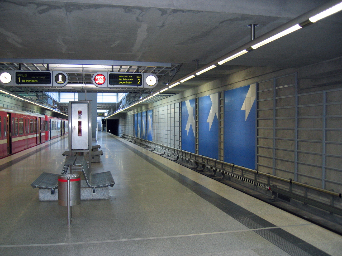 U-Bahnhof Flughafen der U-Bahn Nürnberg, Bahnsteigebene, Blick von Osten